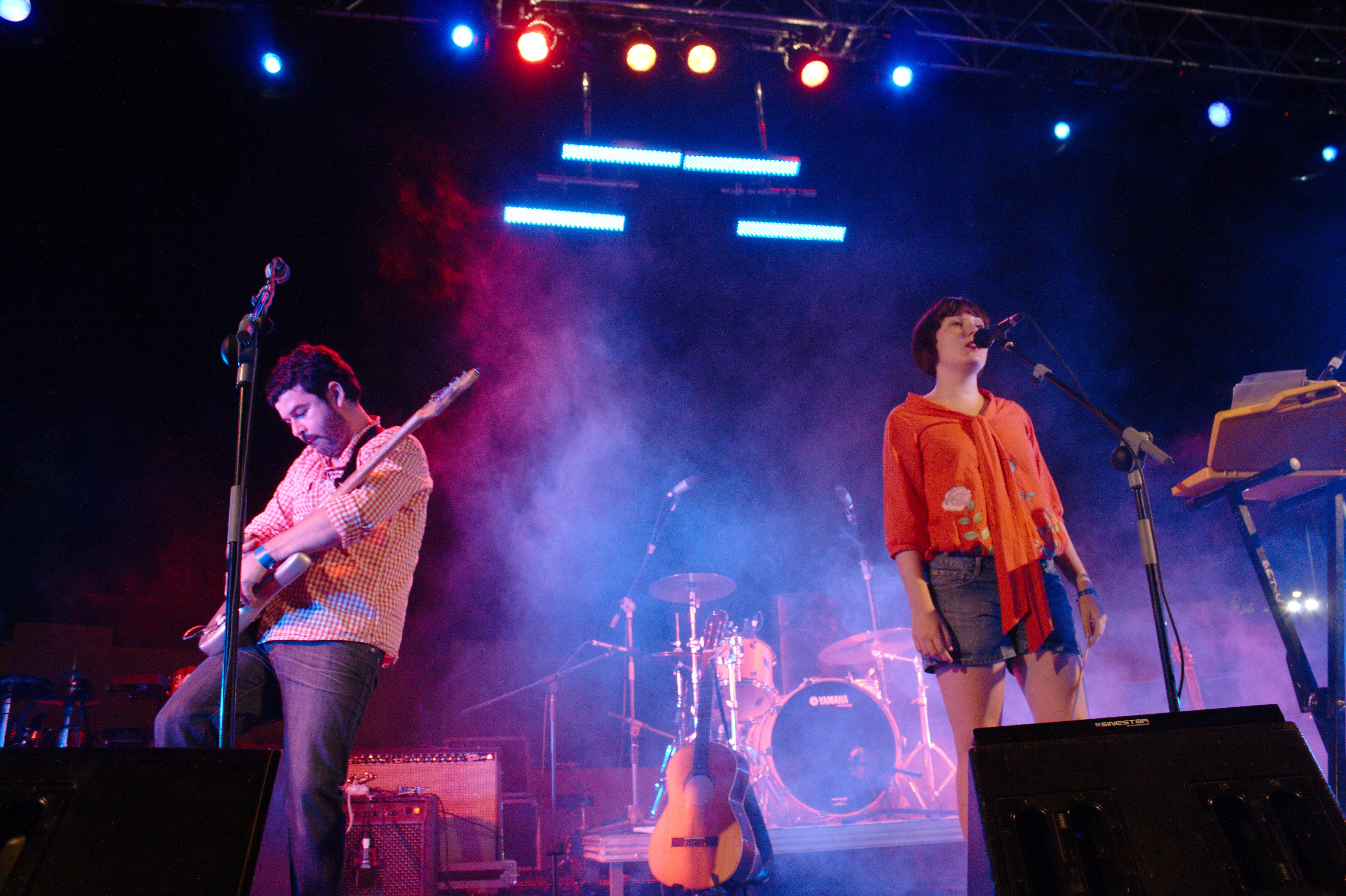 El grupo Klaus & Kinski, durante el festival de música South Pop Isla Cristina 2009